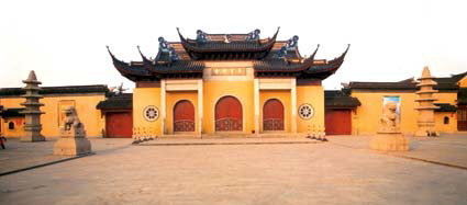 东南第一丛林,一郡梵刹之冠 吴语: 东南第一丛林,一郡梵刹之冠